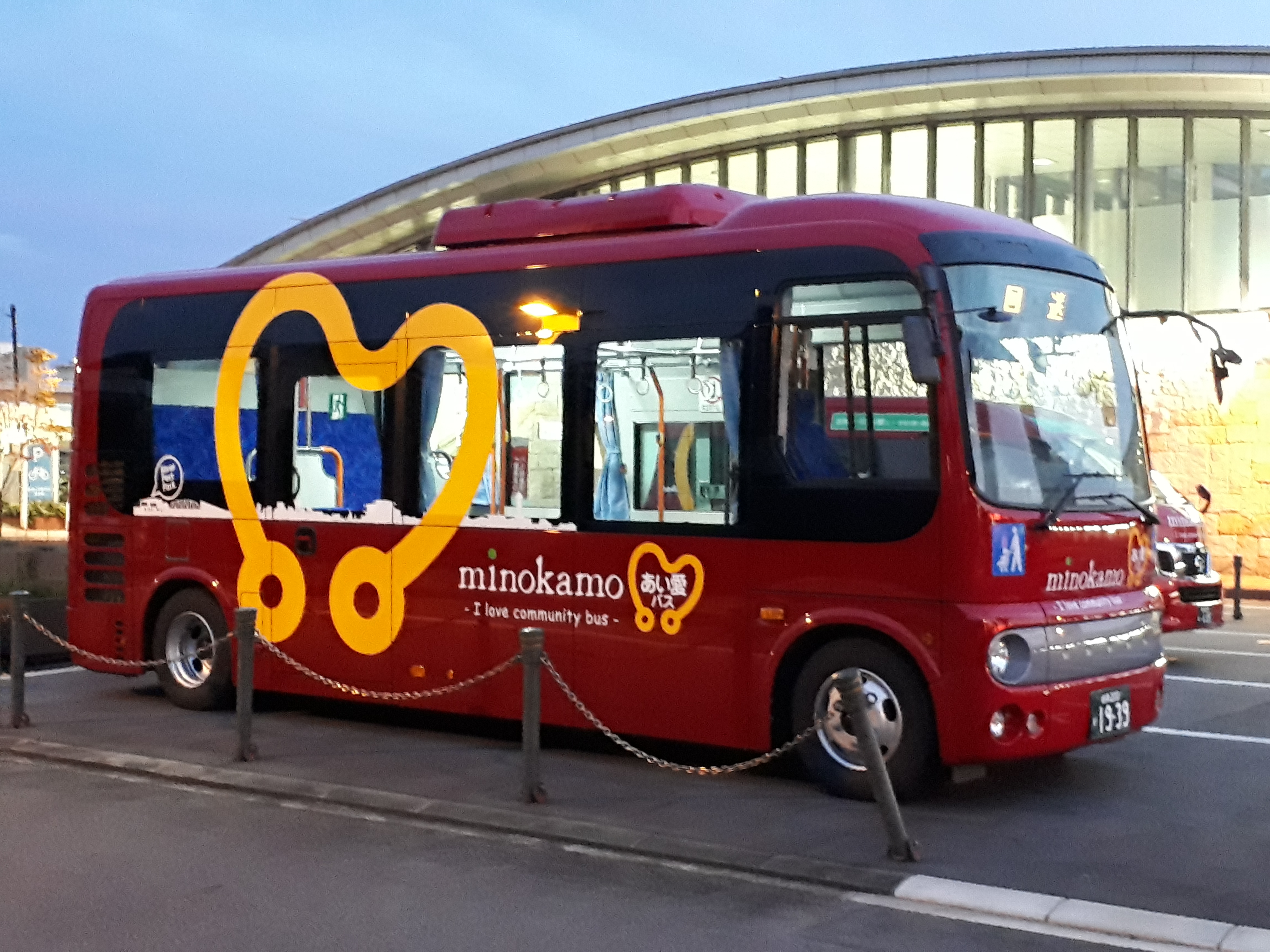 2018年10月に導入された新型車両。